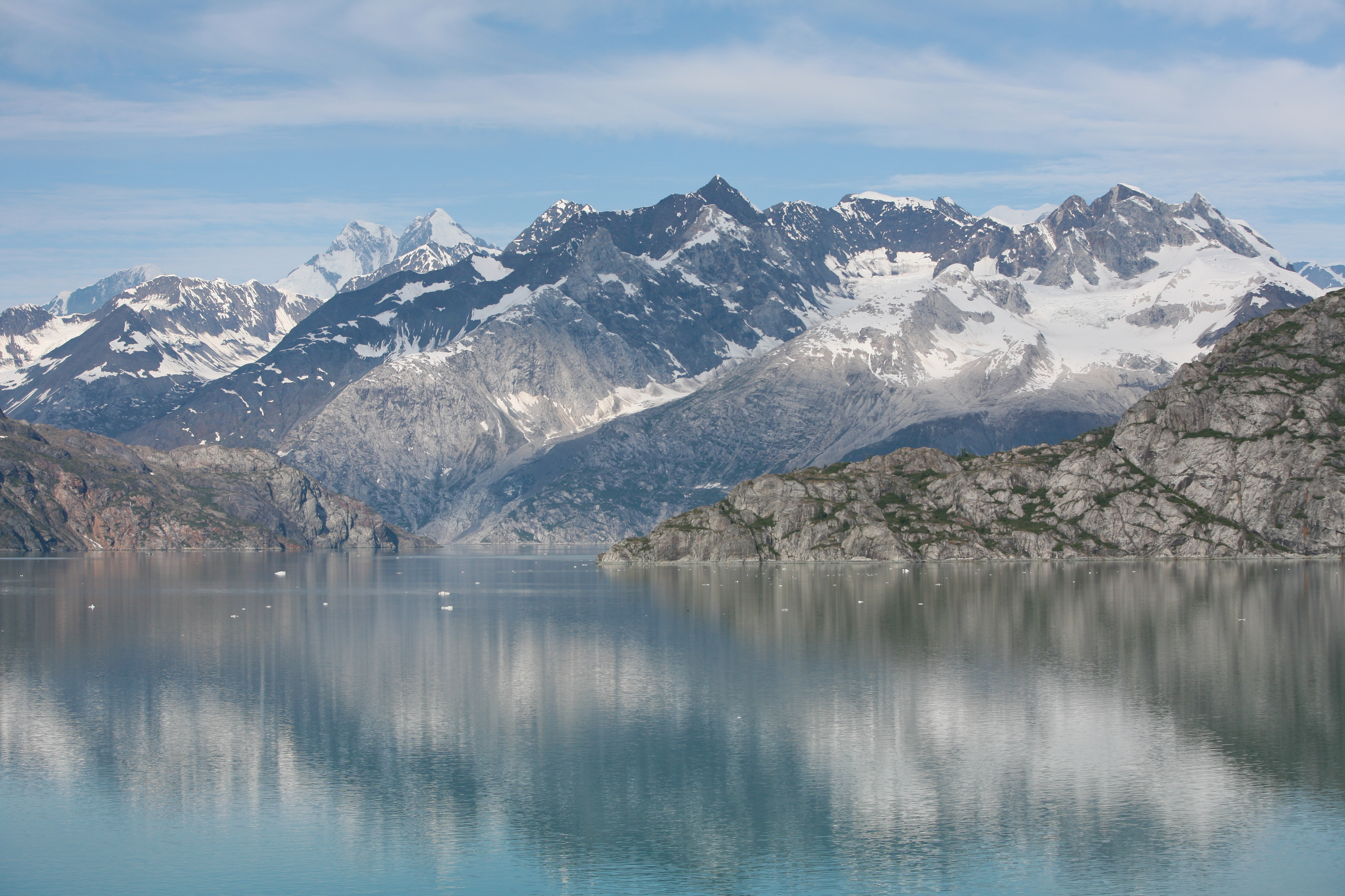 Alaska